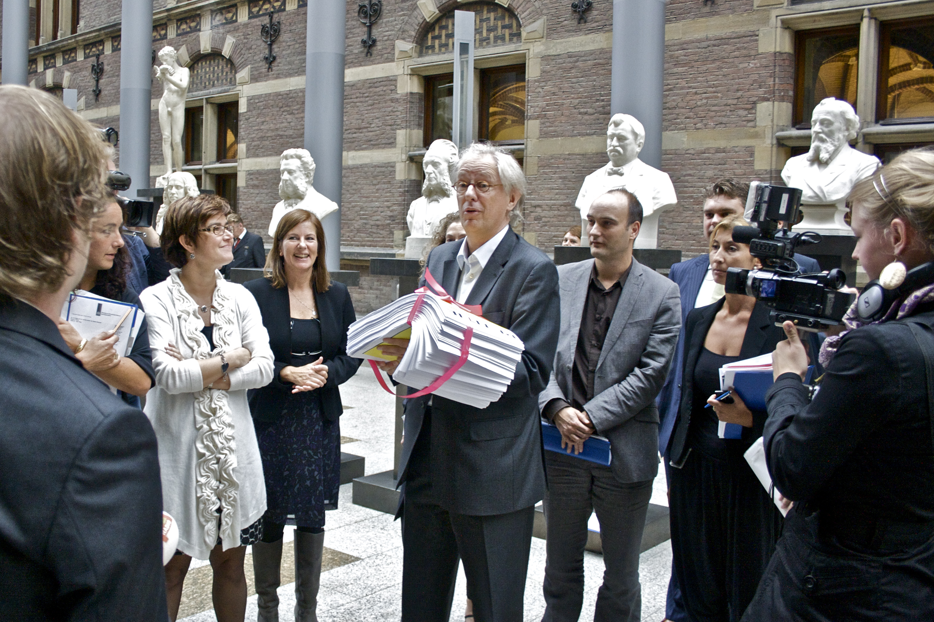 Commissie voorzitter met ruim 21.000 handtekeningen petitie "Uit de kast, Uit de klas"